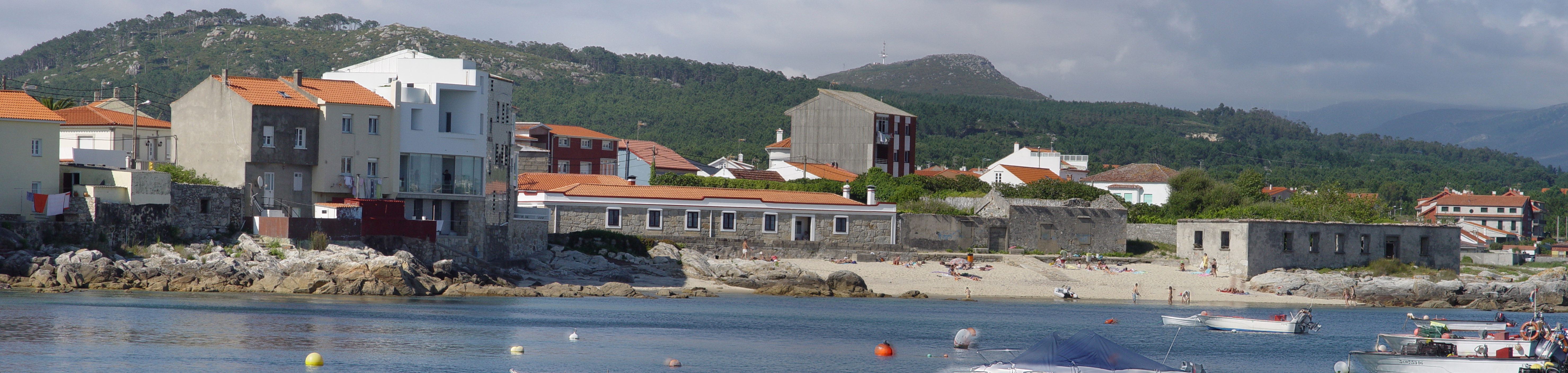 PLAYA RIVEIRIÑA. CORRUBEDO.GALICIA.SPAIN.EUROPE